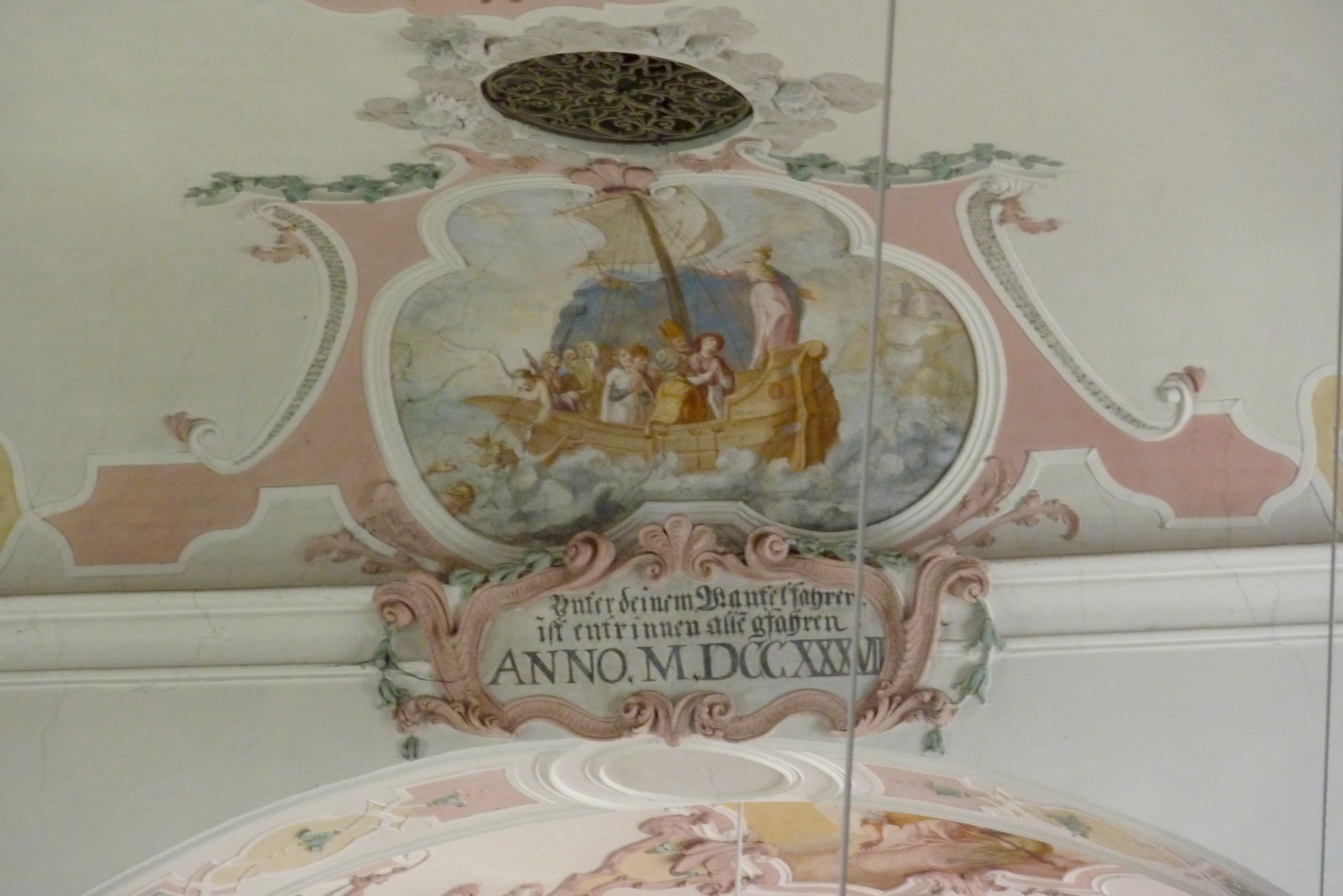 Katholische Pfarrkirche St. Georg in Aislingen im Landkreis Dillingen an der Donau (Bayern), Deckenbilder von Matthias Wolcker (1737), Darstellung über dem Chorbogen: Schiff auf stürmischer See, Maria mit Schutzmantel am Bug; Inschrift: unter deinem Mantel fahren ist entrinnen alle gfahren ANNO M.DCCXXXVII.